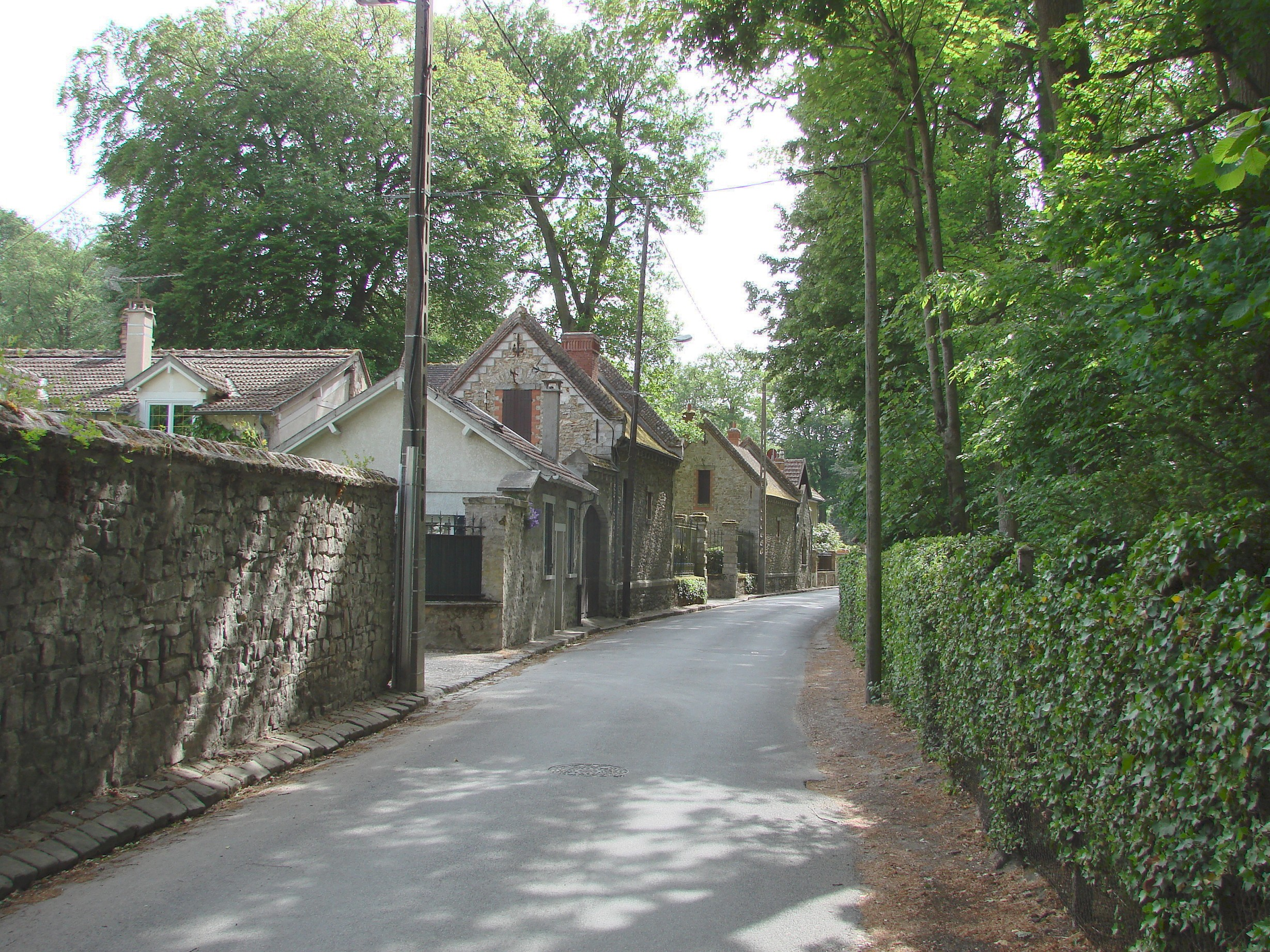 Barbizon, France, Village Road